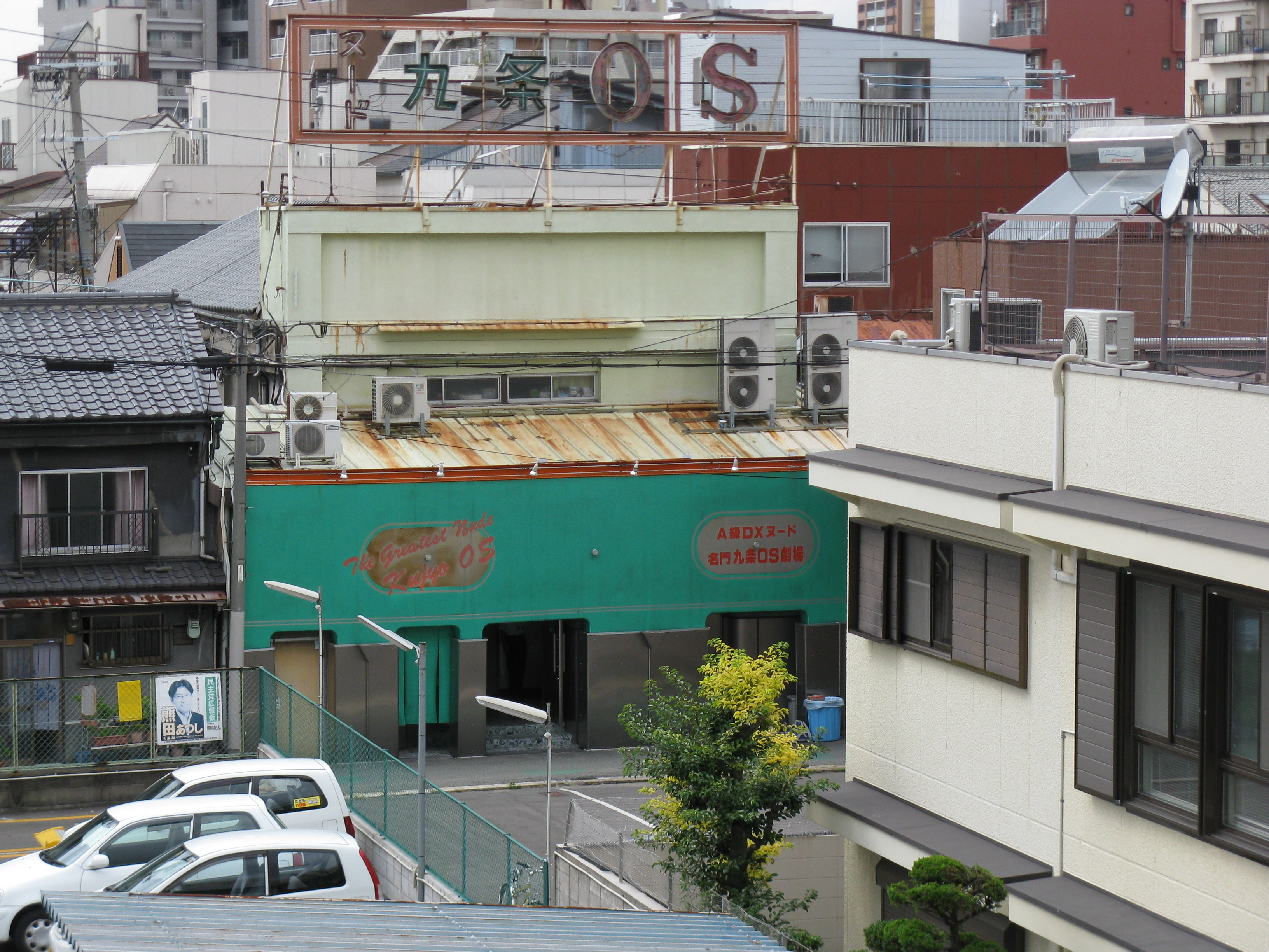 九条OS